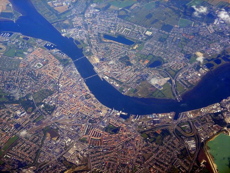 Aalborg fra luften, Nørresundby øverst.